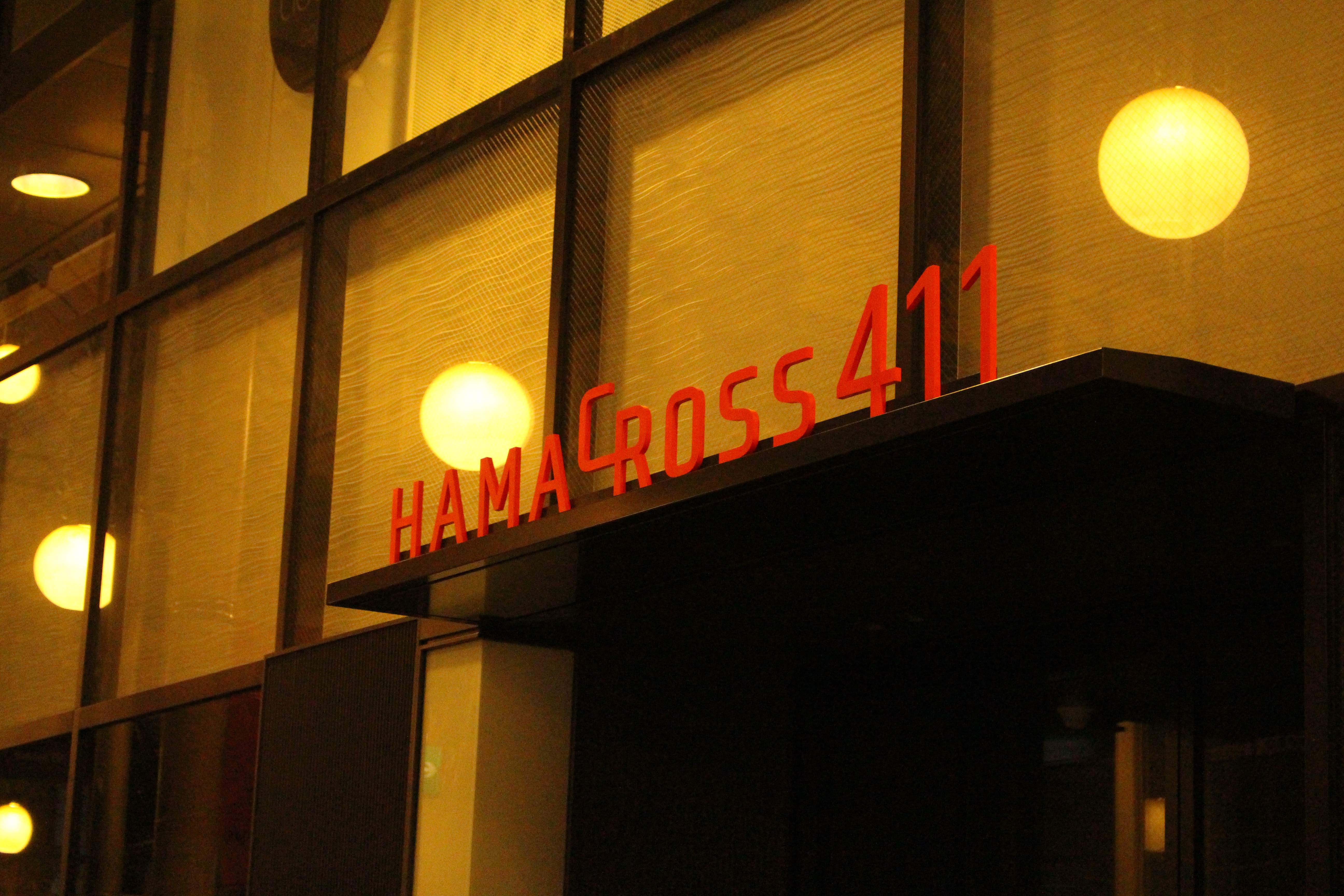 ハマクロス411